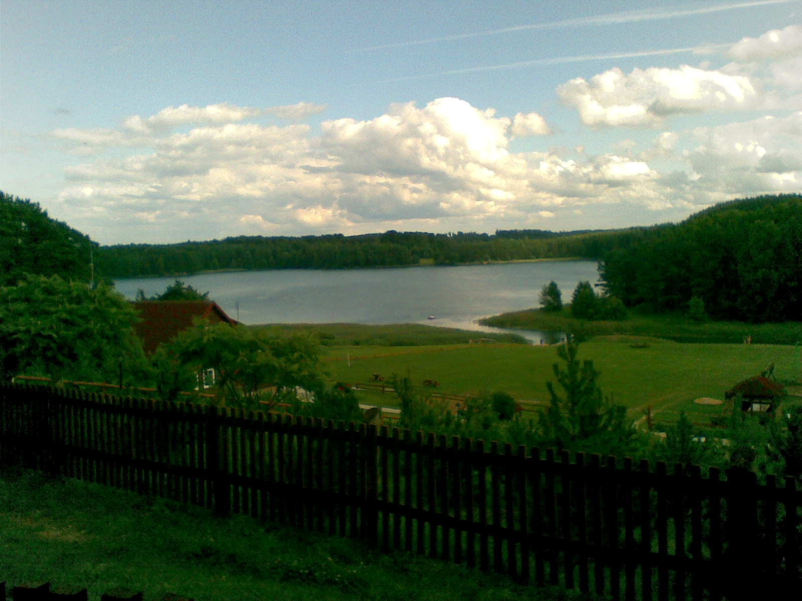 Aukštadvario Kristaus Atsimainymo bažnyčios šventorius - vaizdas nuo pietinės pusės.